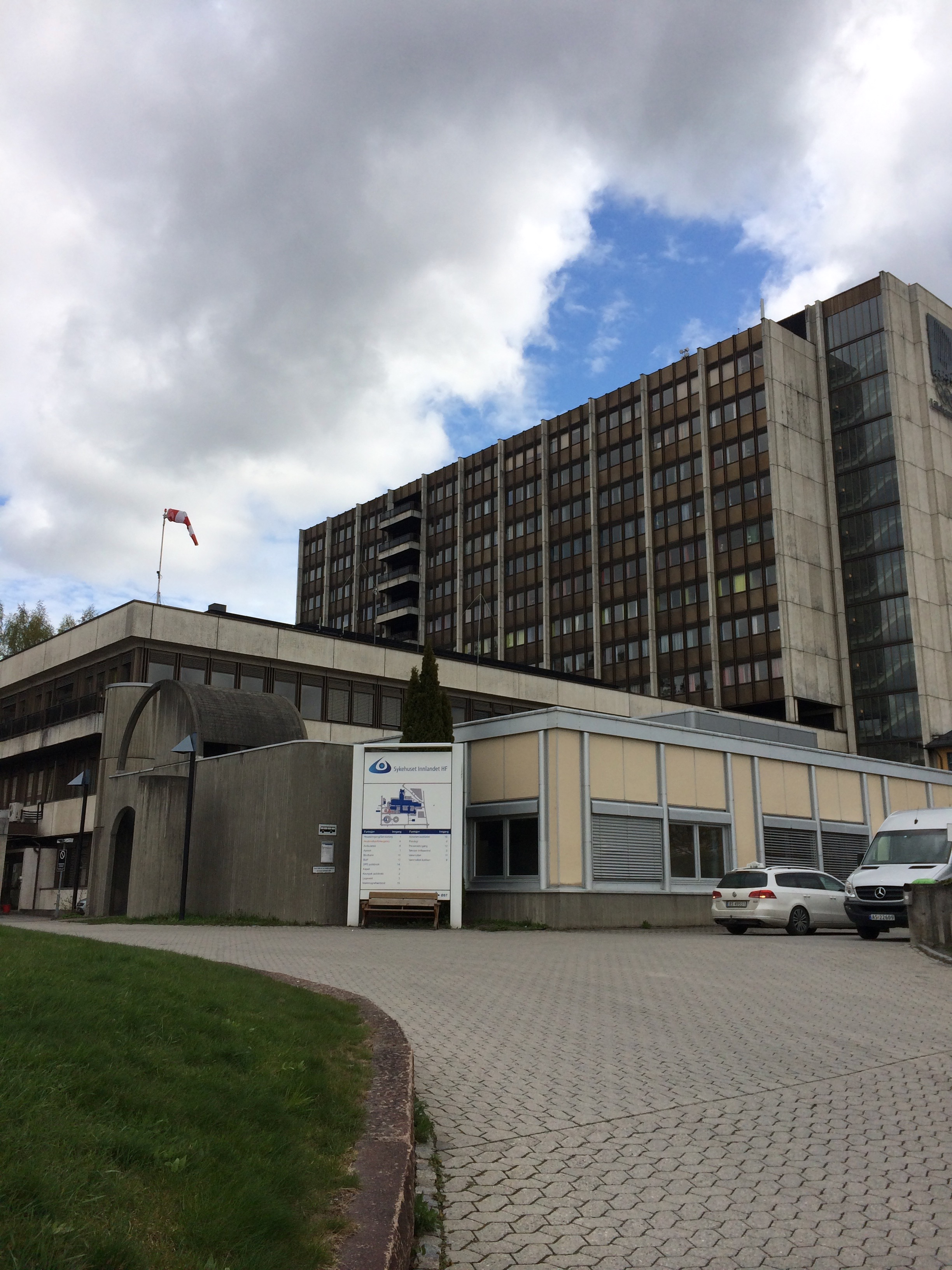 Lillehammer sykehus